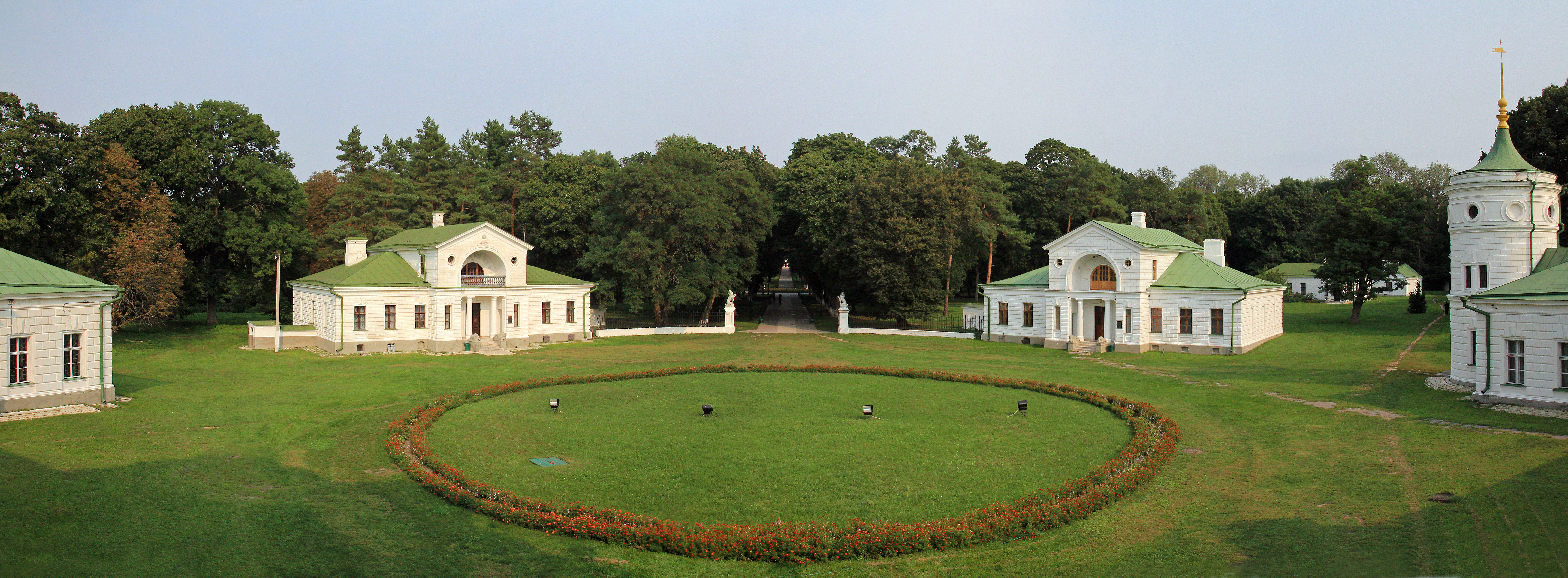 Комплекс споруд садиби "Качанiвка"